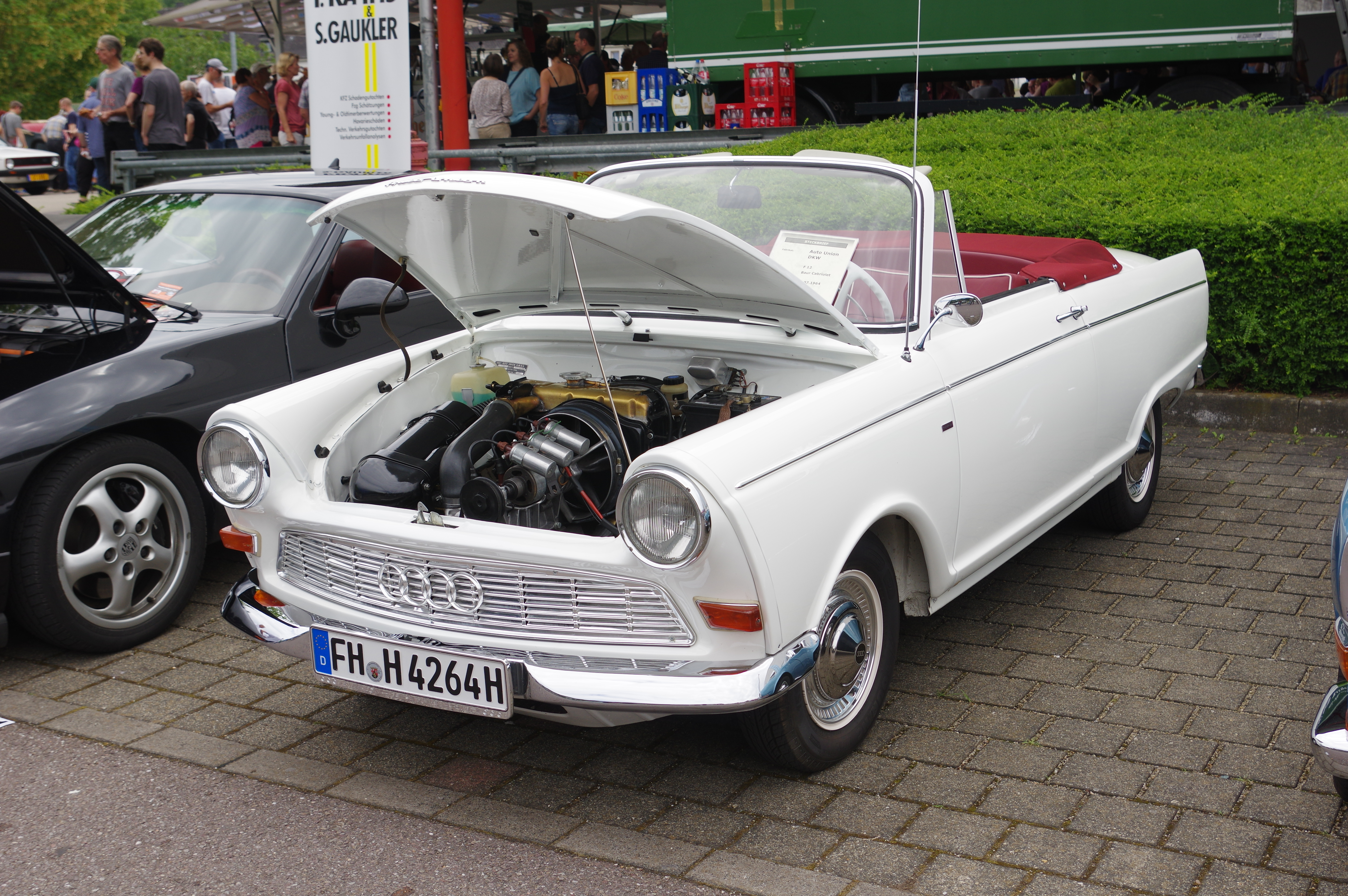 DKW F12 Baur Cabriolet, 1964, 900 cm³, 3 Zyl., 45 PS, 2794 Stück wurden gebaut 32. Internationales Oldtimer Treffen Konz 2016, Das Nummernschild ist verfälscht!